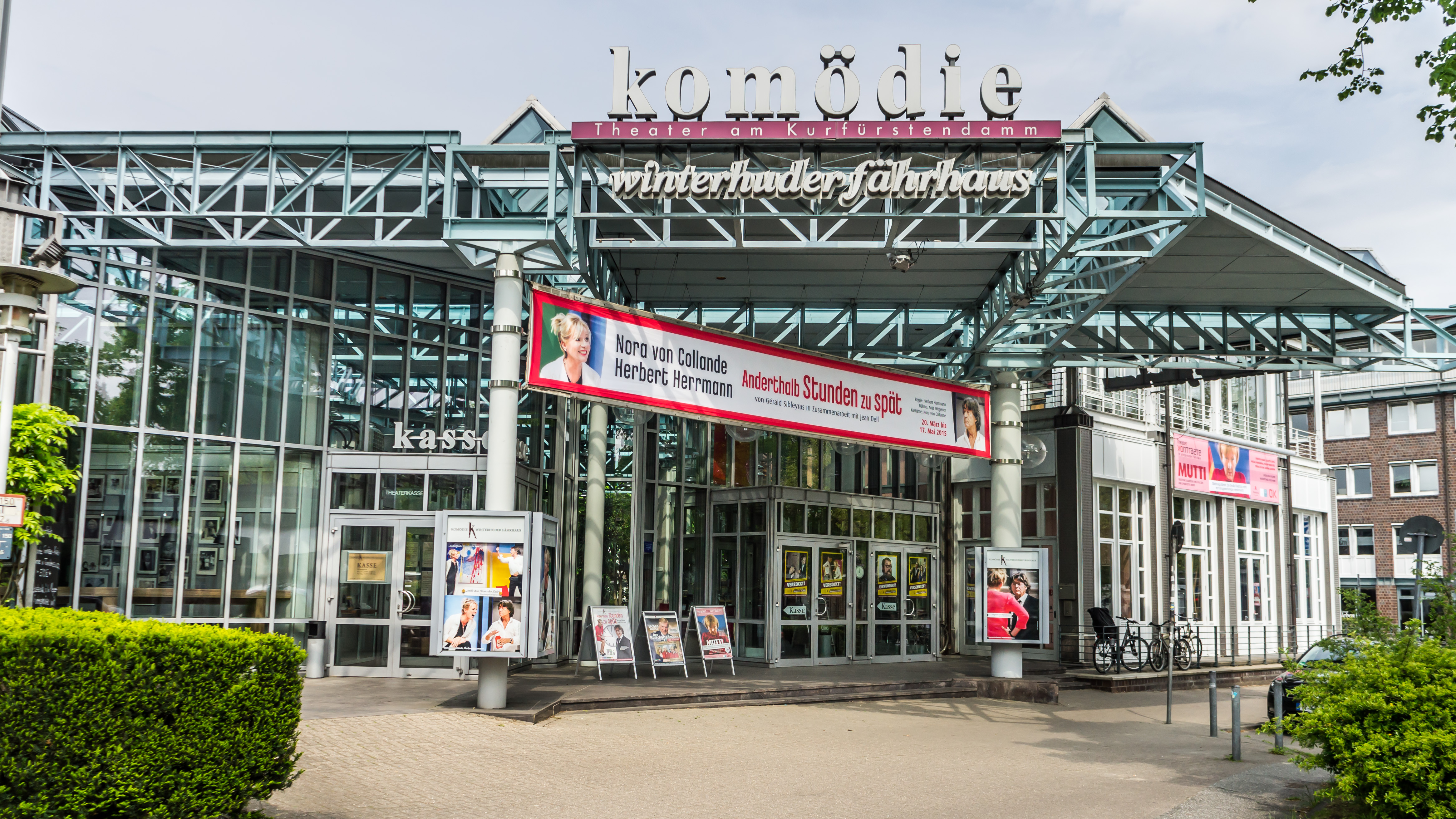 Foto: Google Business View_Thomas Huang_2015 Außenansicht Komödie Winterhuder Fährhaus